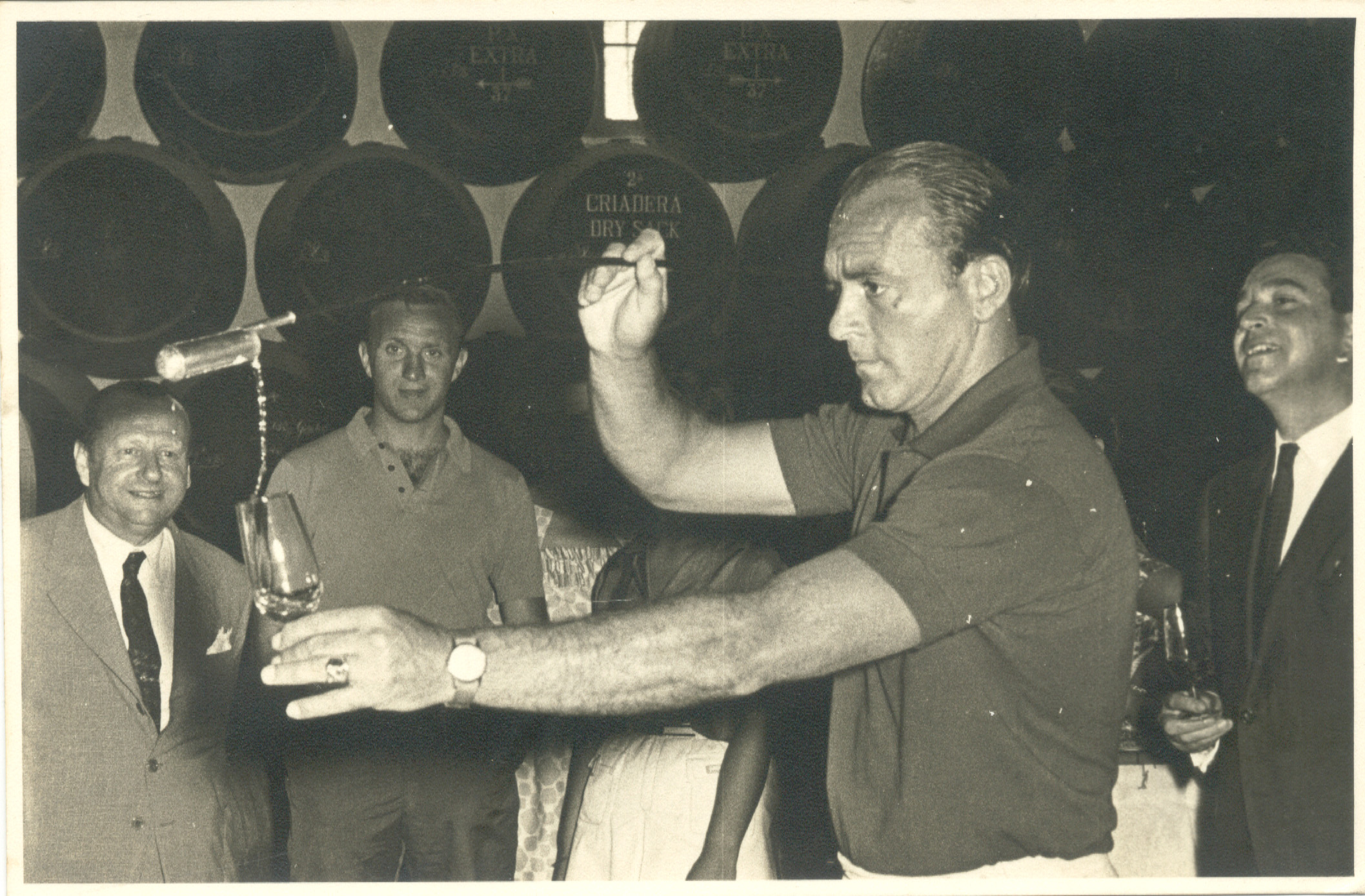 Alfredo Di Stefano venenciando en las Bodegas de Williams & Humbert Ltd., durante su visita el día 11 de Agosto de 1963. También se puede ver en la foto a José Santamaría